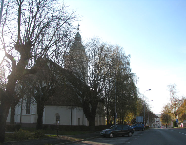 Crkva Presvetog Trojstva, Donja Stubica